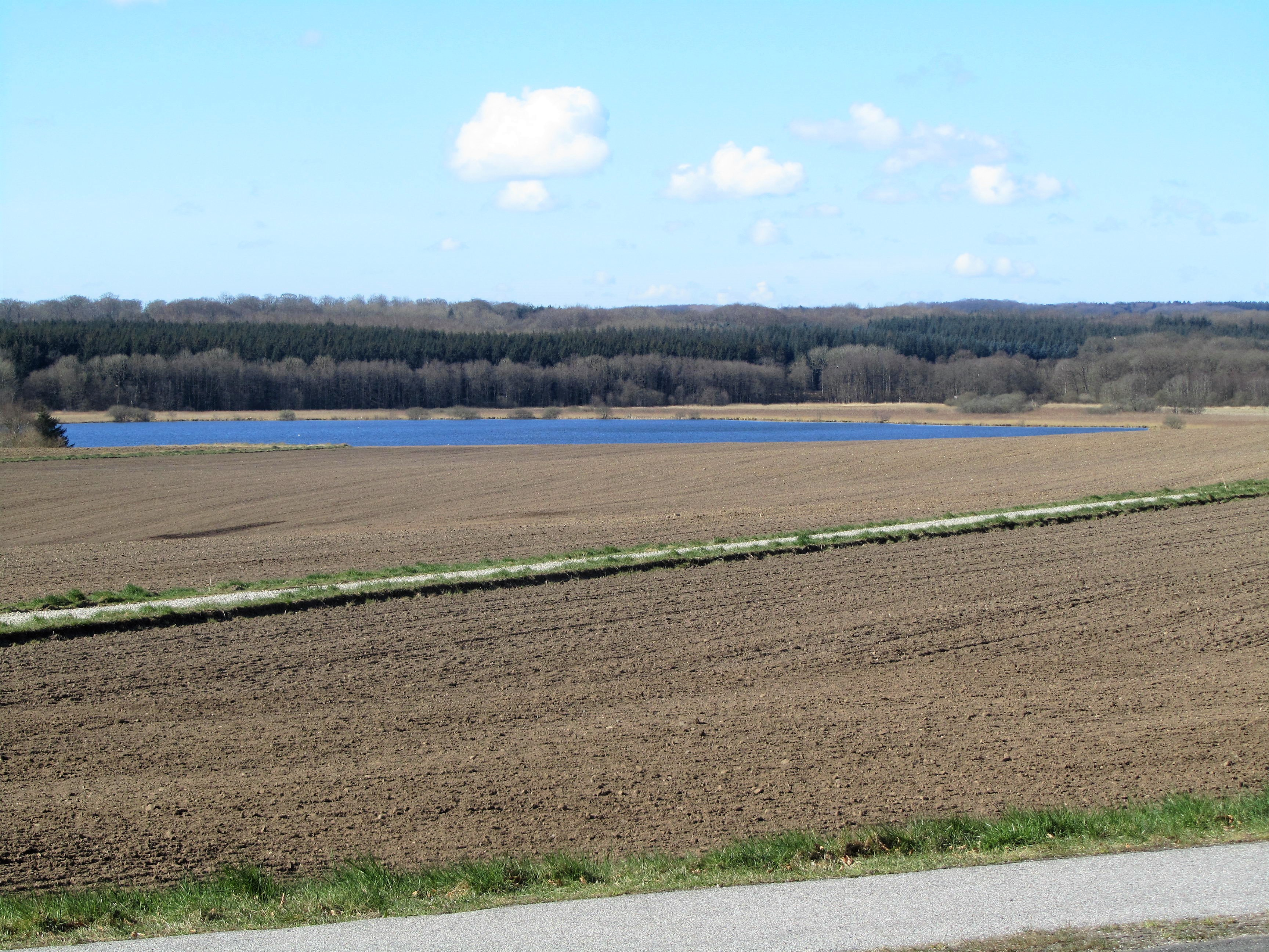 Lading Sø Vestenden set mod sydvest